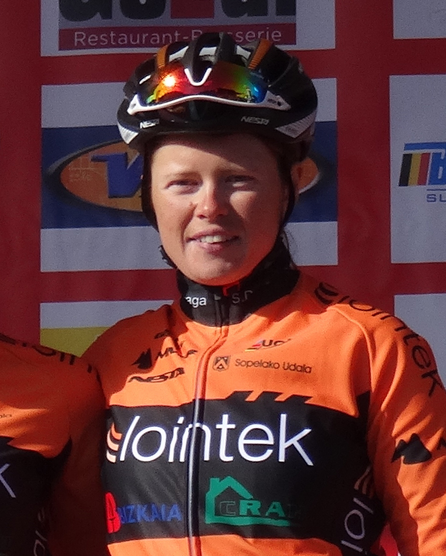 Aurore Verhoeven